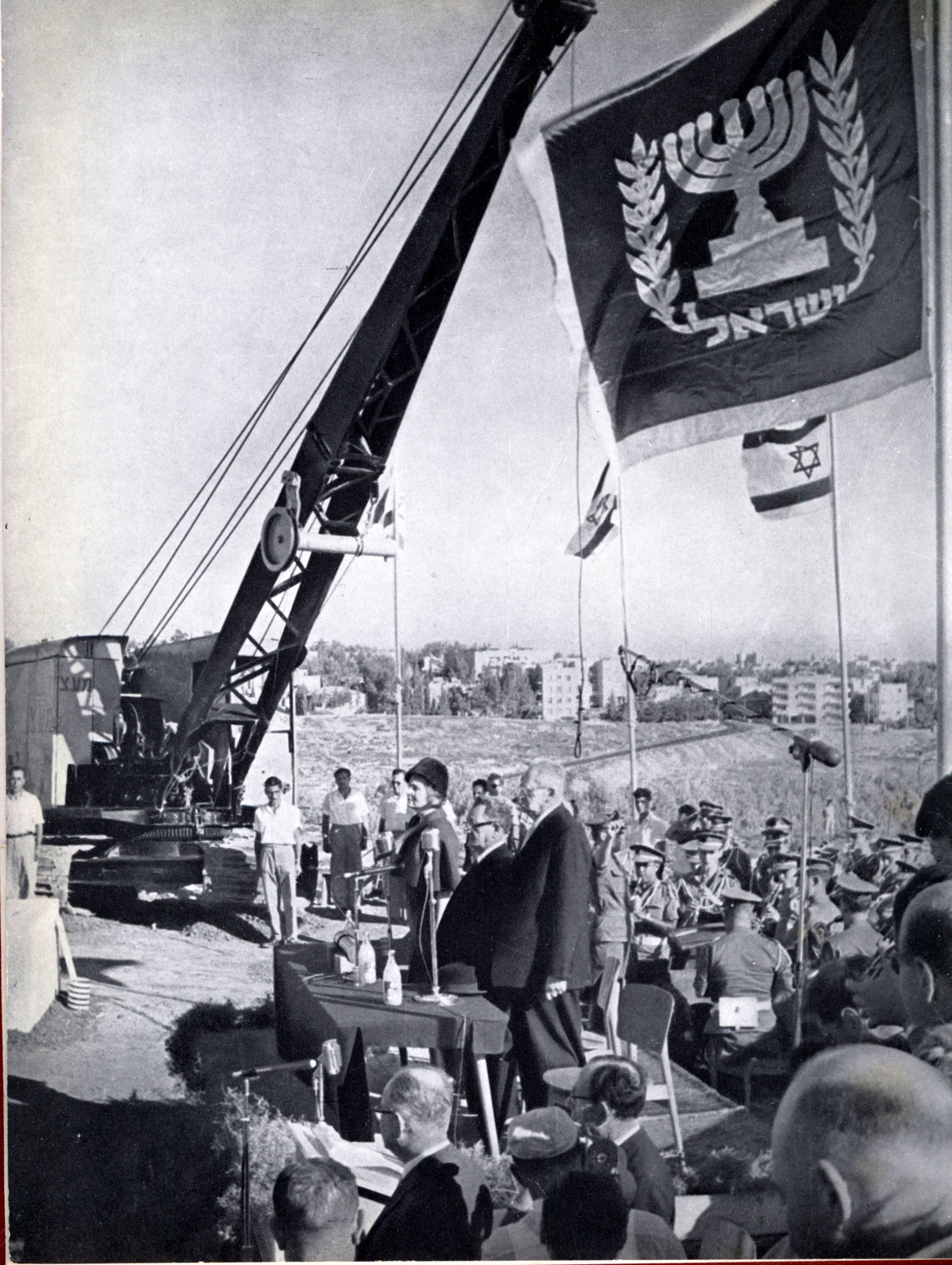 הנחת אבן הפינה למשכן הקבע של הכנסת בקריה בירושלים - 14.10.1958